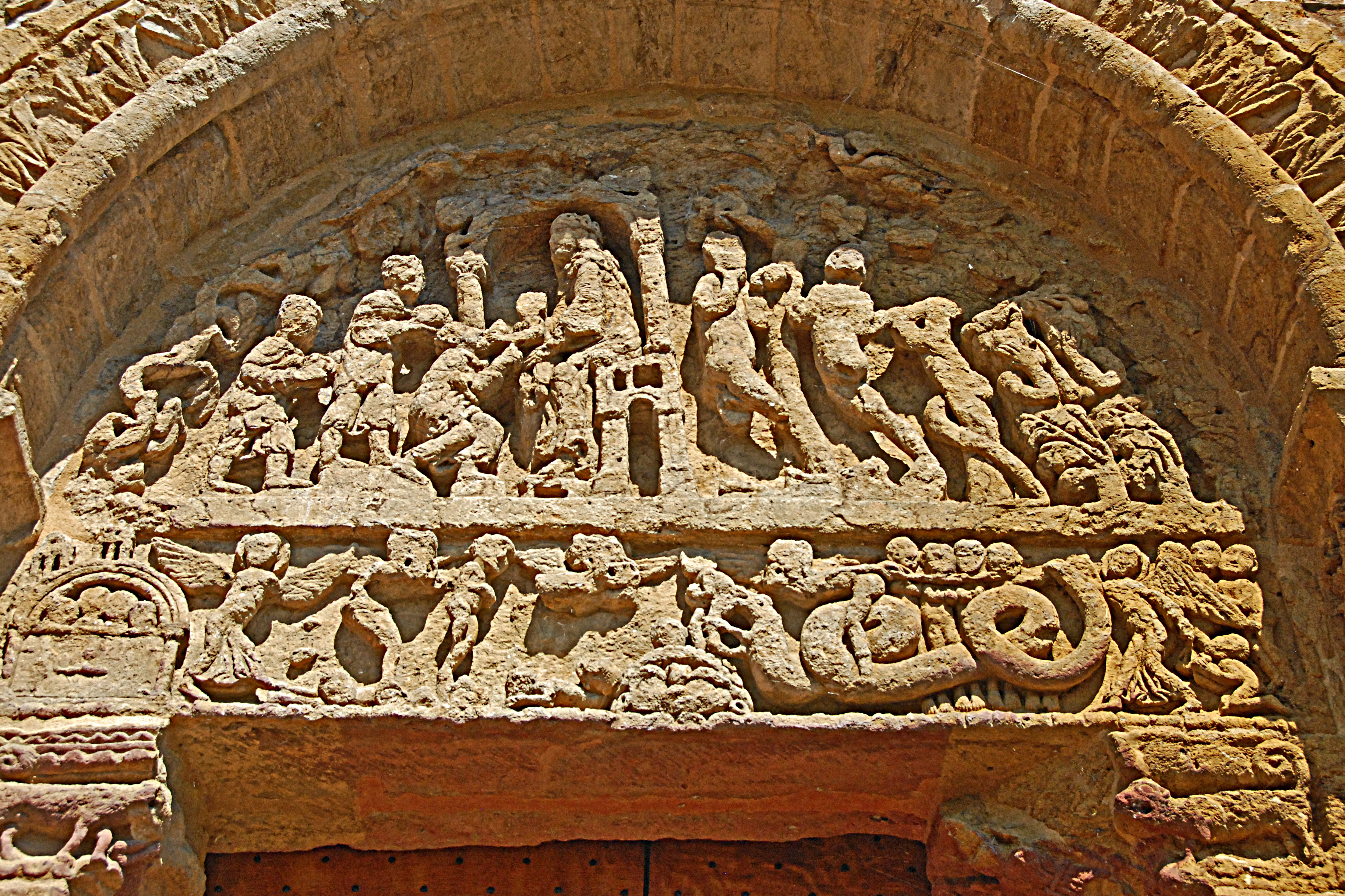 Südportal Kloster, Tympanon mit Sturz